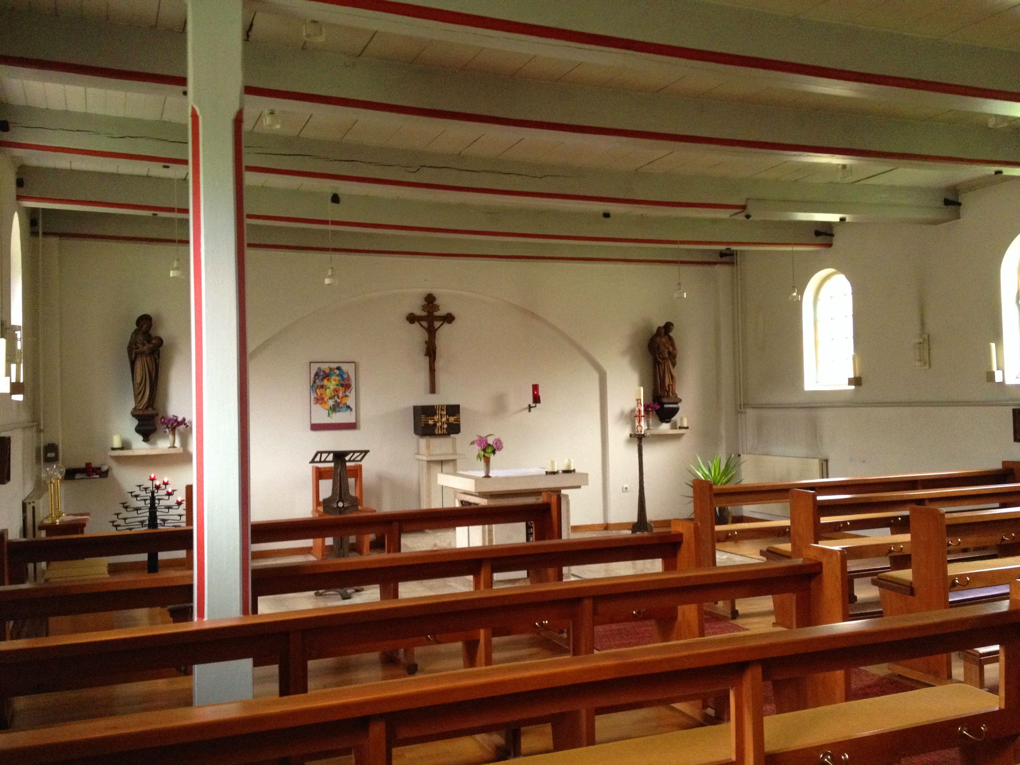 Neustadtgödens, kath. Kirche St. Josef